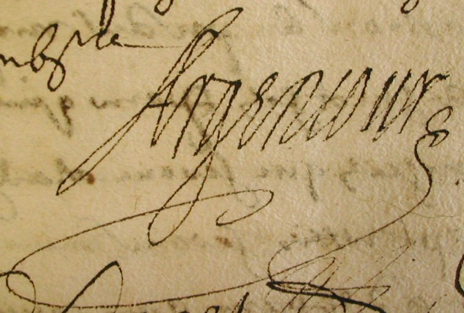 Signature de Pierre de Conty d'Argencour